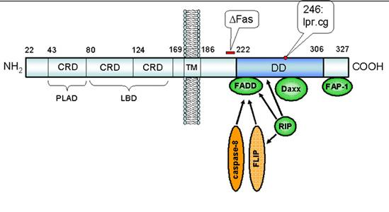 Site de fixation de Daxx et FADD